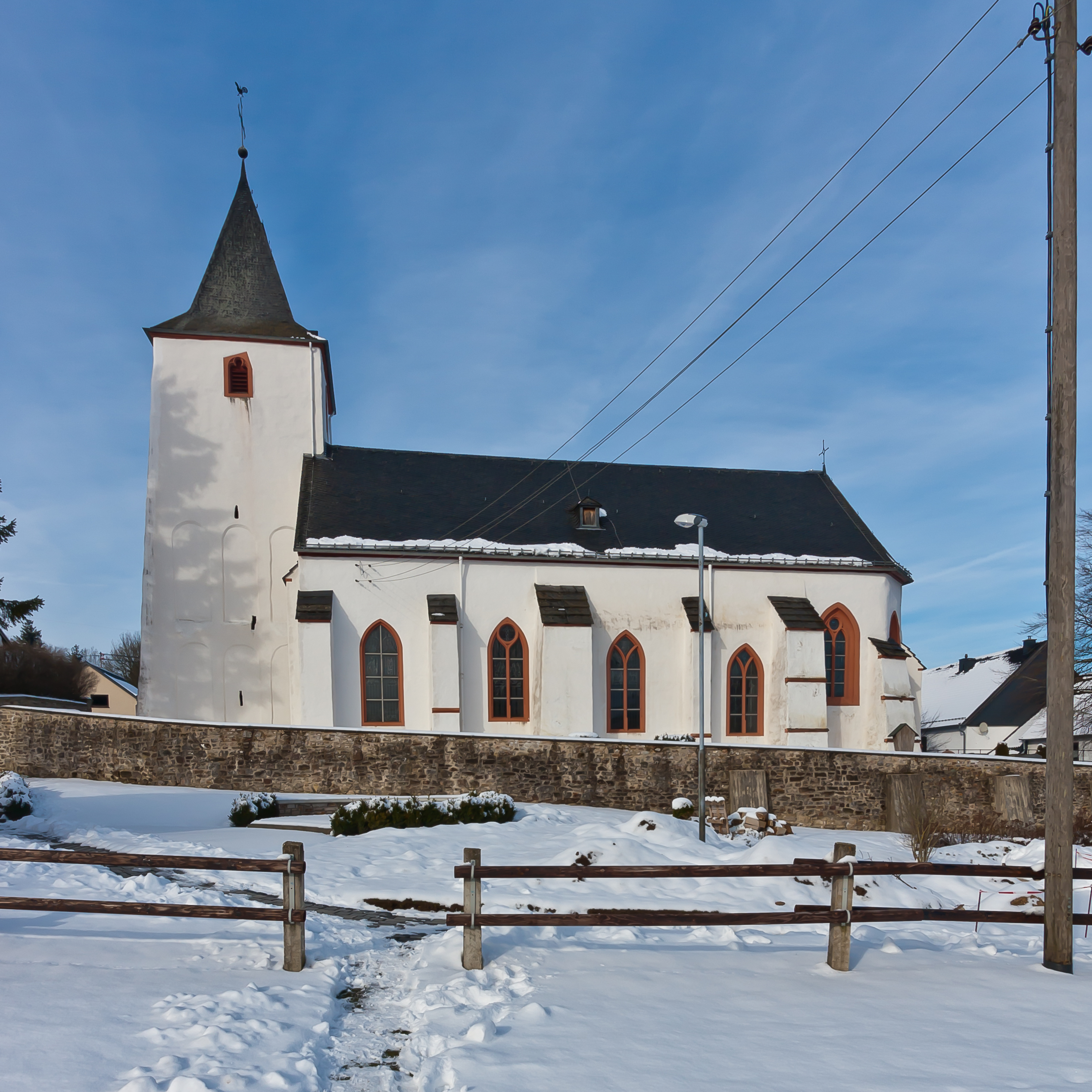 St. Mariä Geburt in Dahlem-Baasem This is a photograph of an architectural monument.